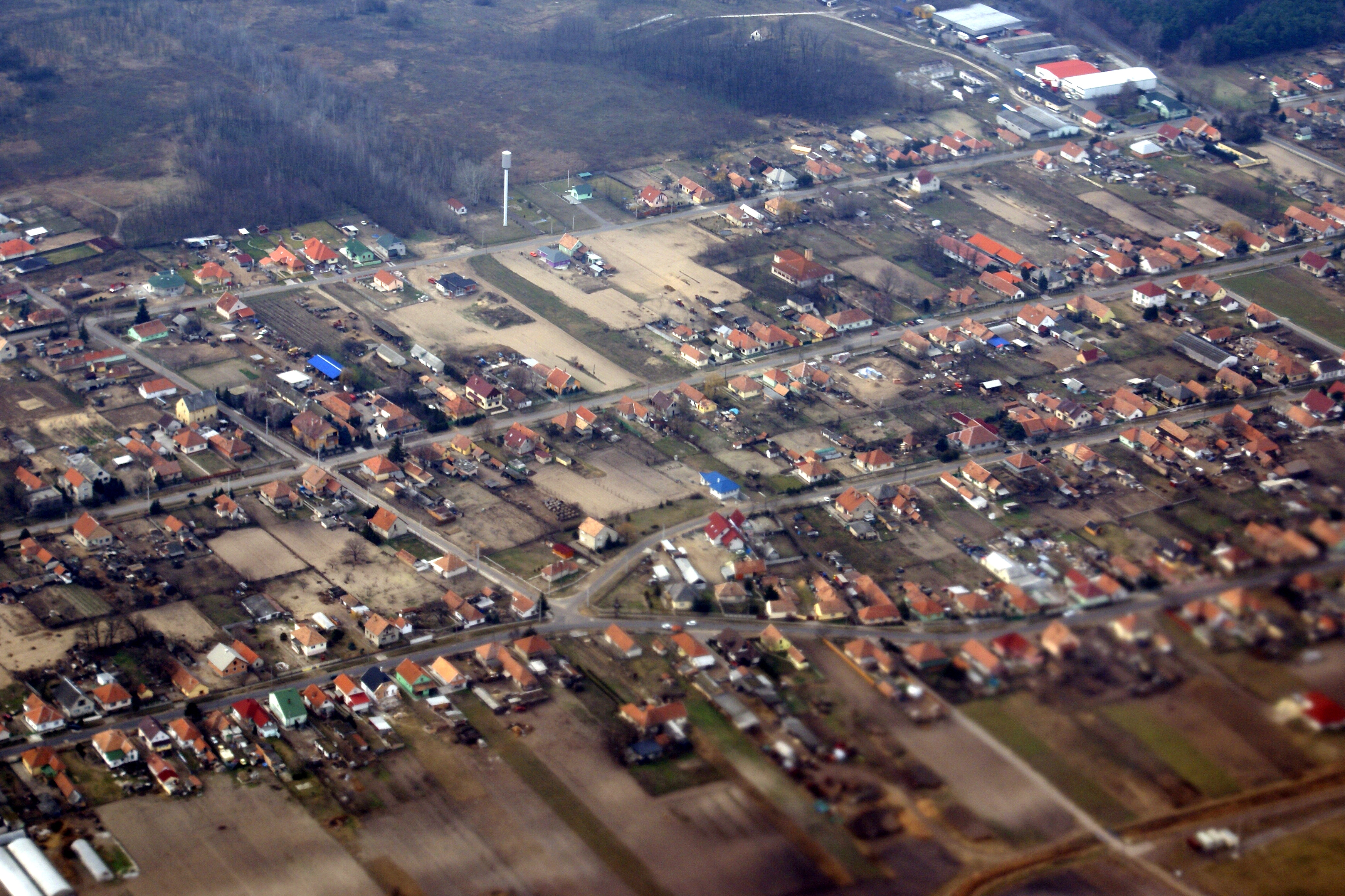 BUD FLIGHT ORY-BUD FROM OM-NGB